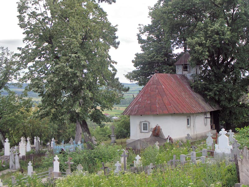 Biserica de jos din Butoieşti, cătunul Popeşti. Foto: ALexandru Baboş, iulie 2007.